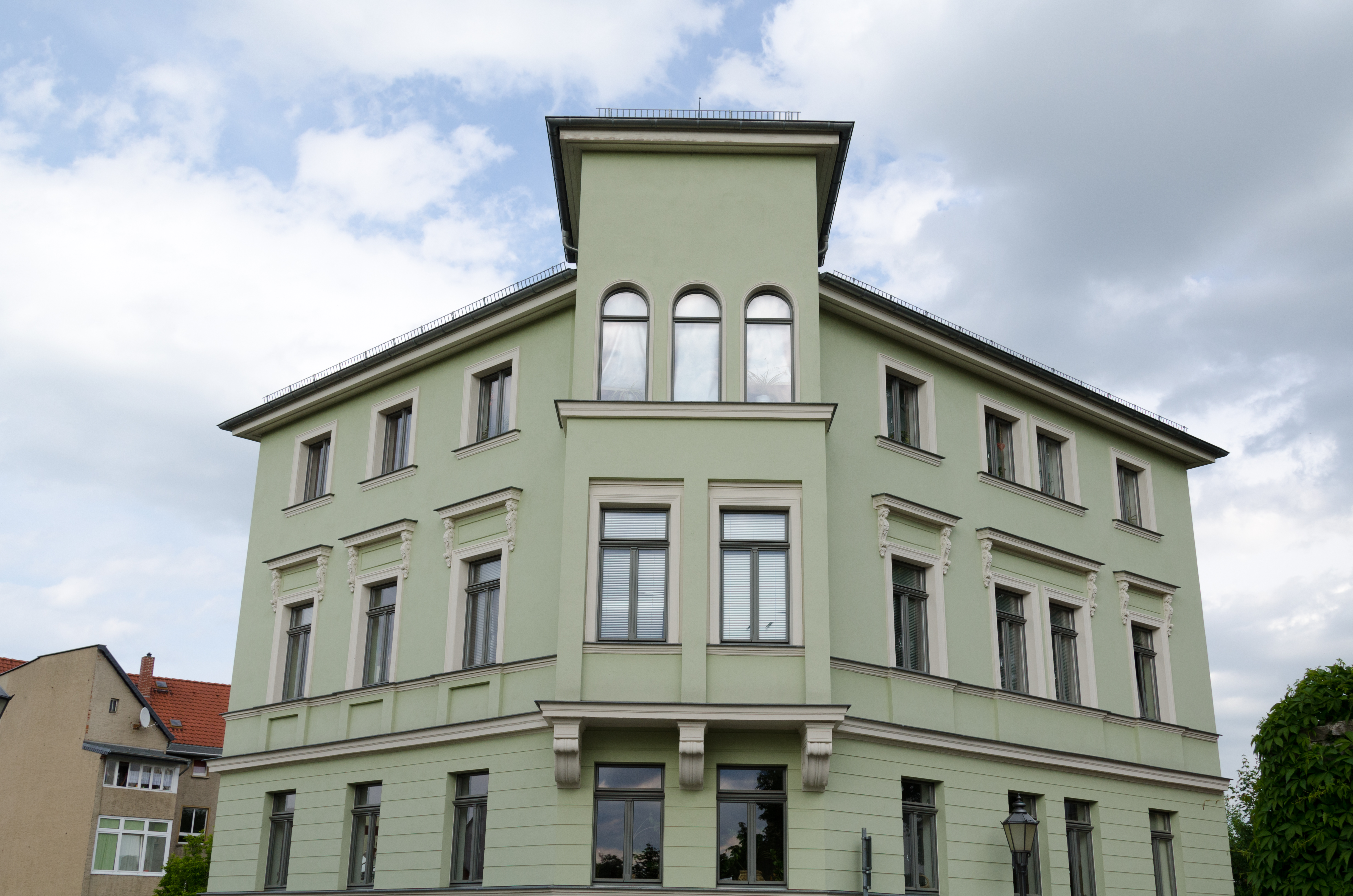 Zeitz, Besenstraße 5a